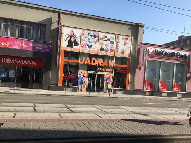 Pohled na bývalé kino Jadran na ulici Palackého v Brně Králově Poli